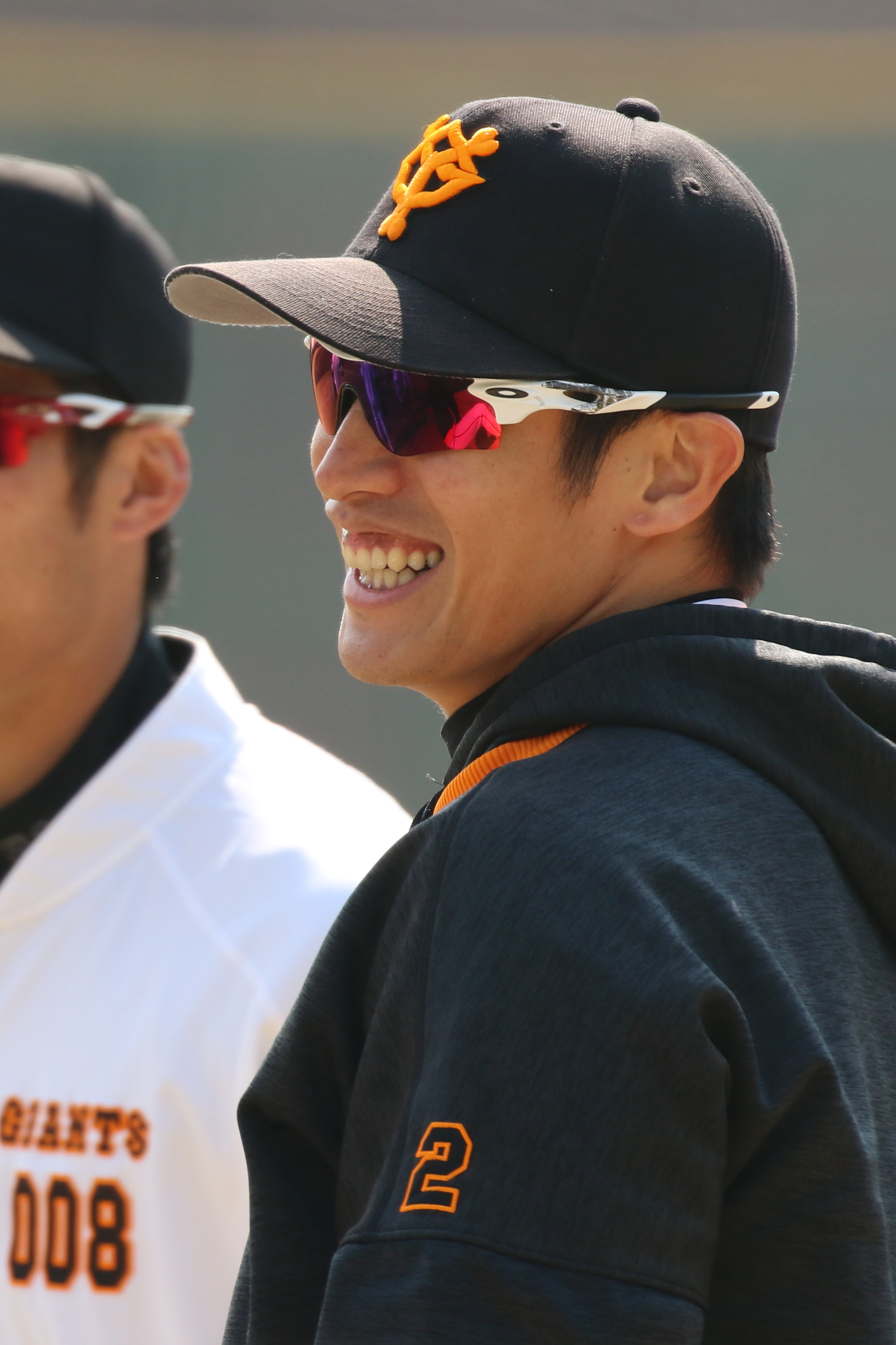 ジャイアンツ陽選手